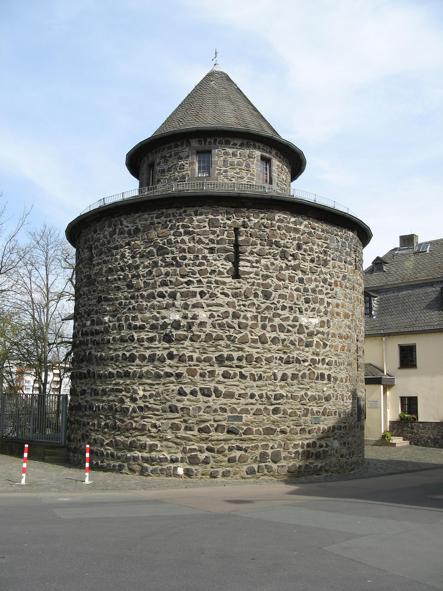 Der Katzenturm in Limburg an der Lahn, ehemaliger Turm der Stadtmauer, heute Marinemuseum